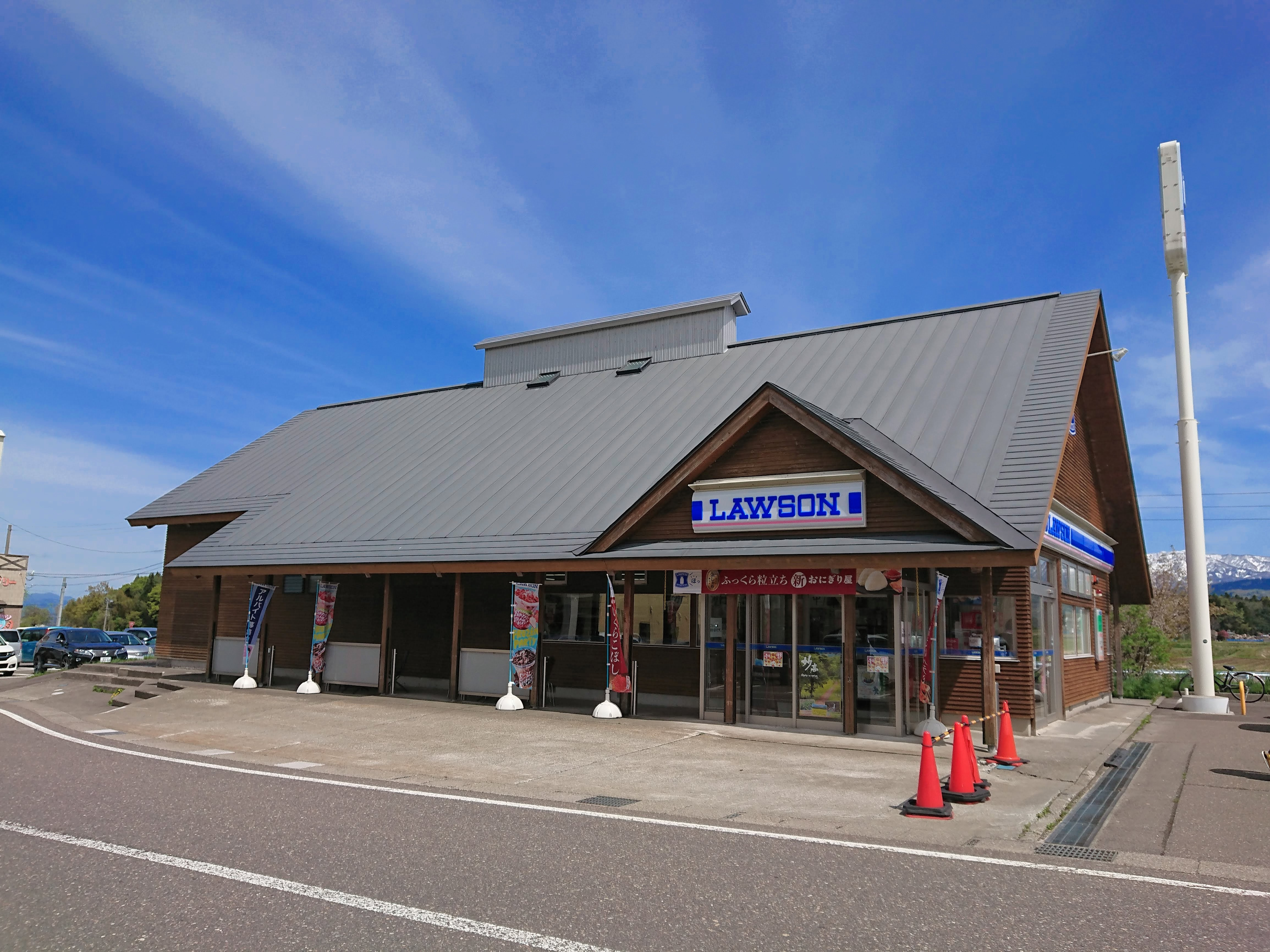 ローソンみちの駅あらい店の外観